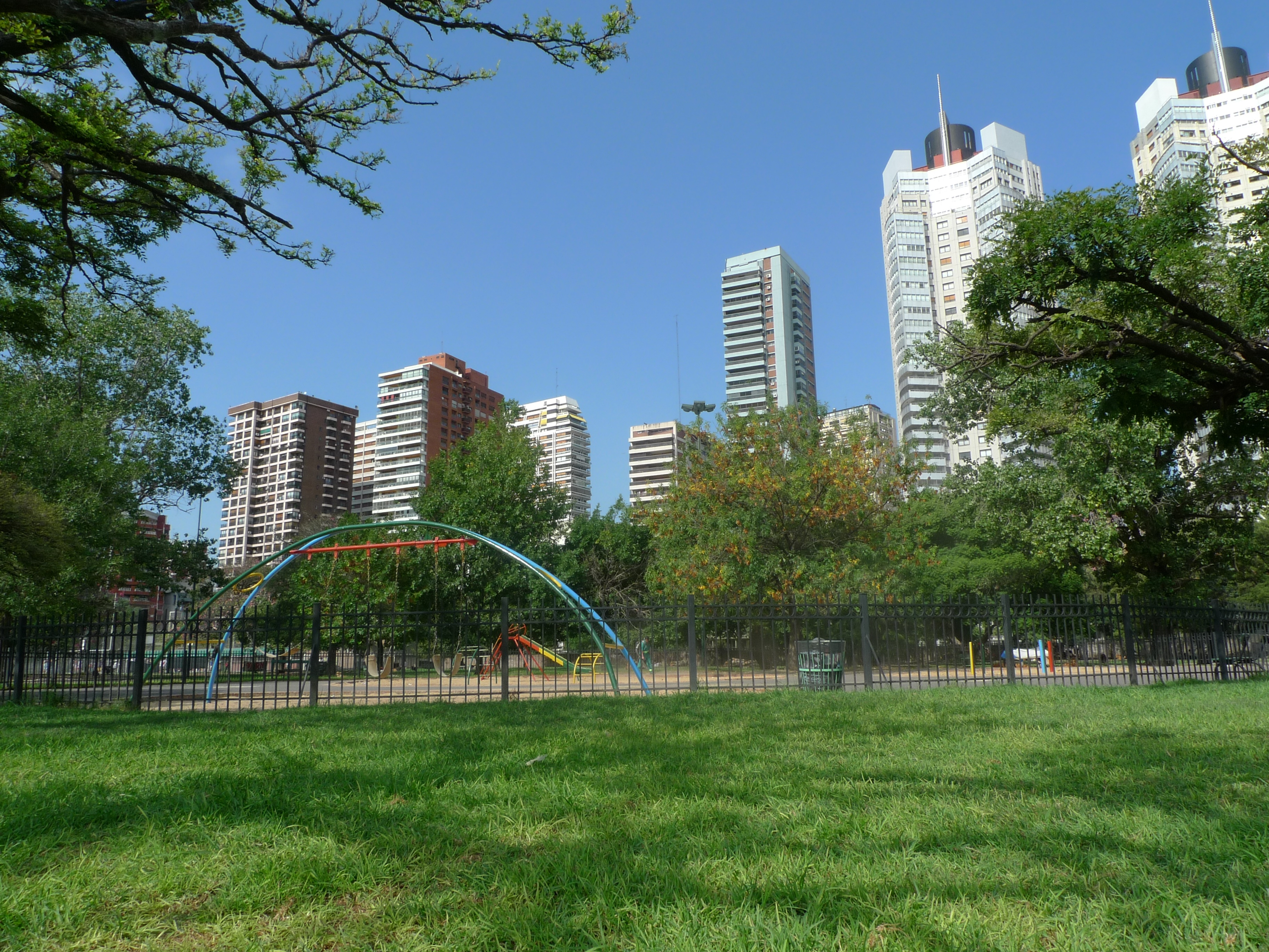 Las Heras Park, Buenos Aires.